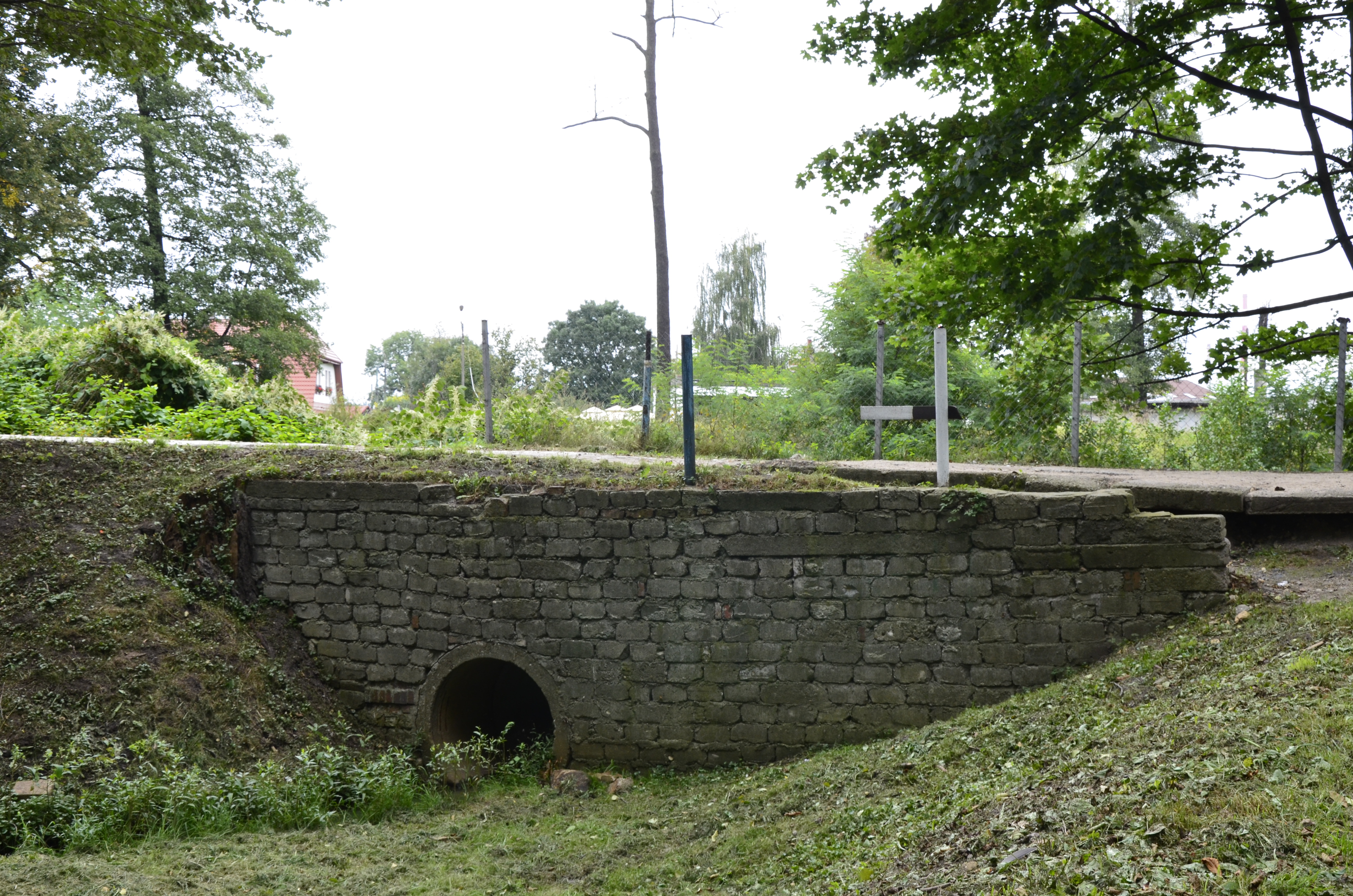 Tychy - most dojazdowy do zespołu zabudowy Huty Paprockiej